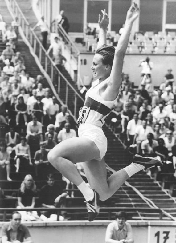 Margrit Herbst ADN-ZB Kluge 26.6.71 Leipzig: XXII. DDR-Meisterschaften der Leichtathleten (2. Tag) . Beim Weitsprungwettbewerb der Fünfkämpferinnen stellte Margrit Herbst (SC Magdeburg - hier beim Rekordsprung) mit hervorragenden 6,81 m einen neuen DDR-Rekord auf. Damit liegt sie vor dem 200 m Lauf (letzte Disziplin) mit 4243 Punkten in Führung.